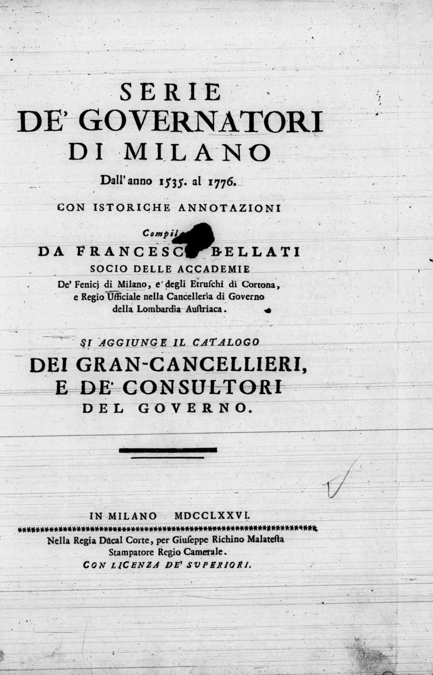 Frontespizio